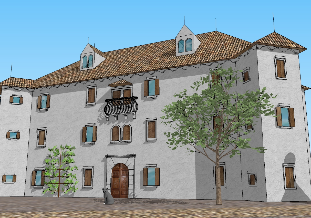 Rekonstrukcija dvorca Dob pri Šentrupertu